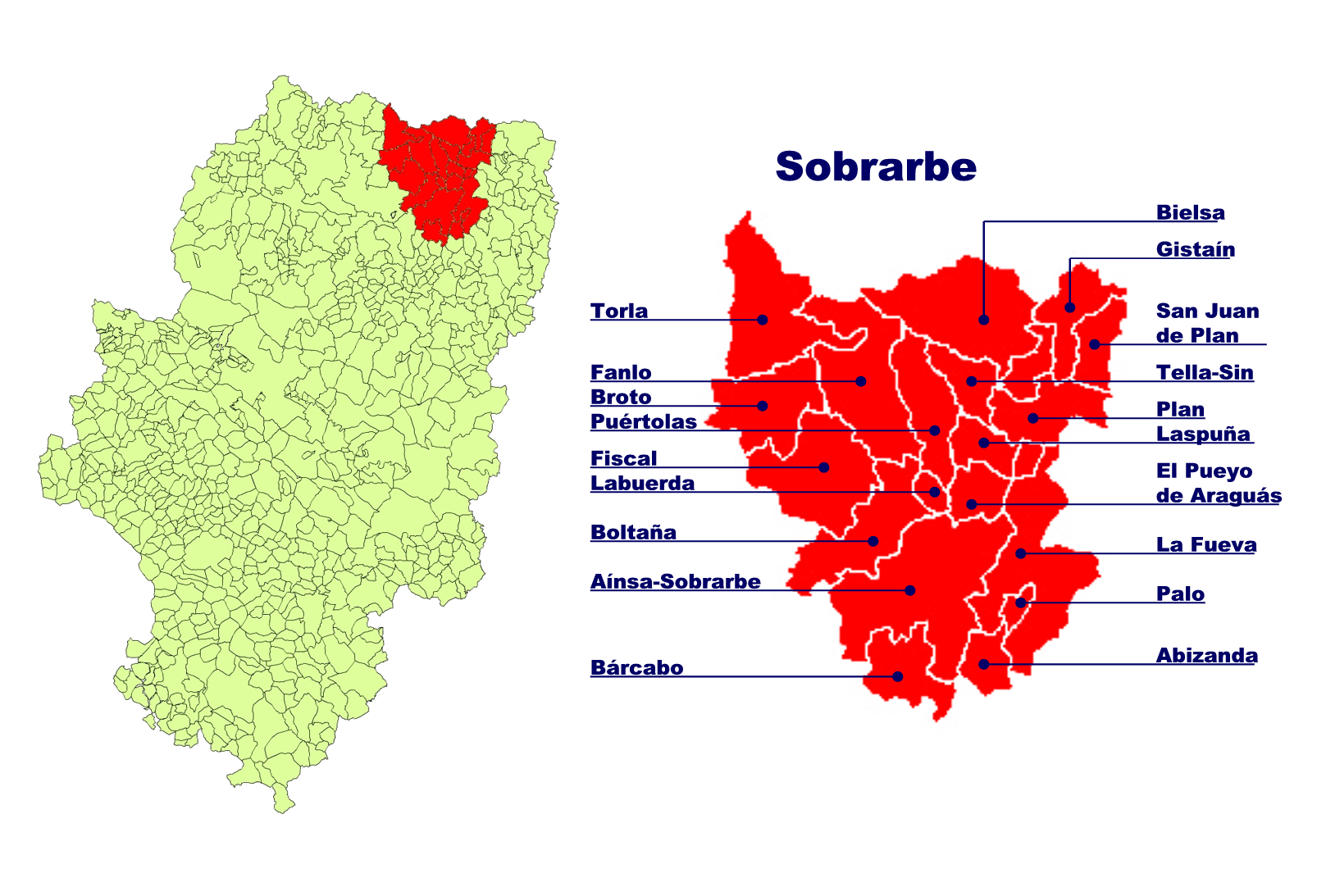 Comarca de Sobrarbe